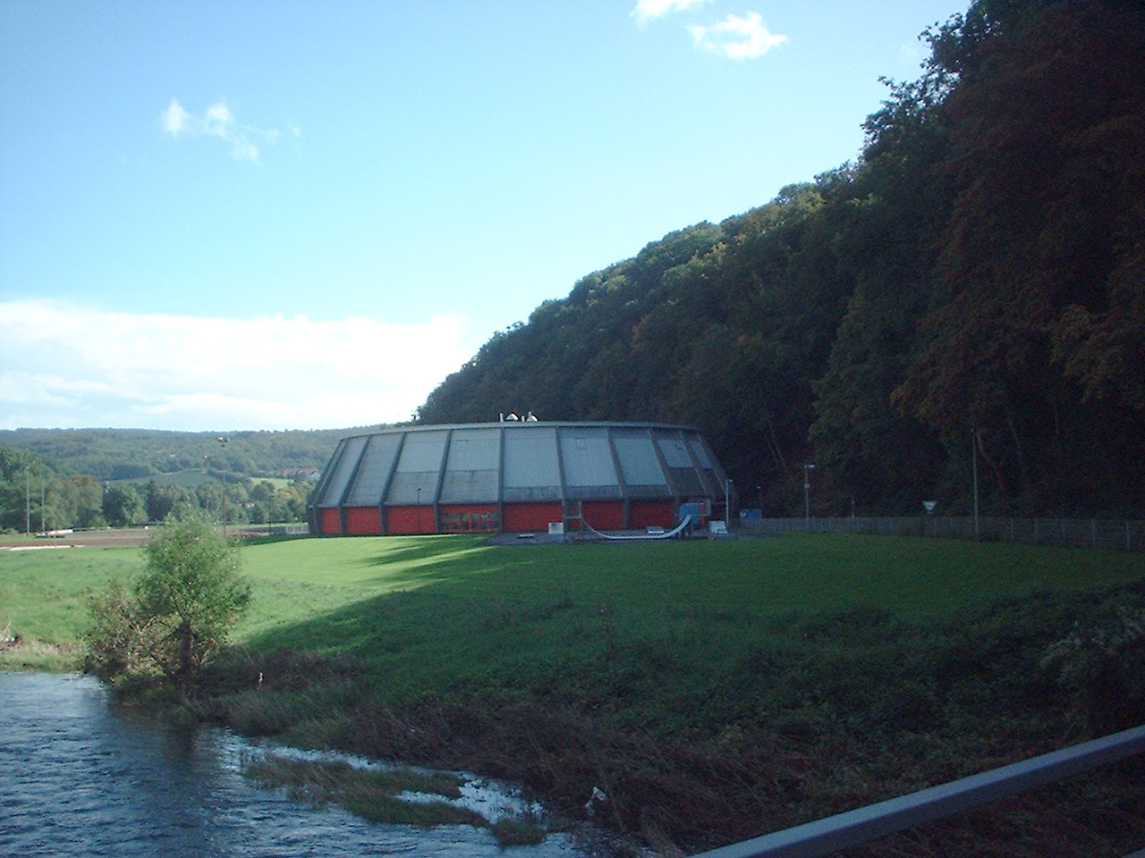 Rundturnhalle